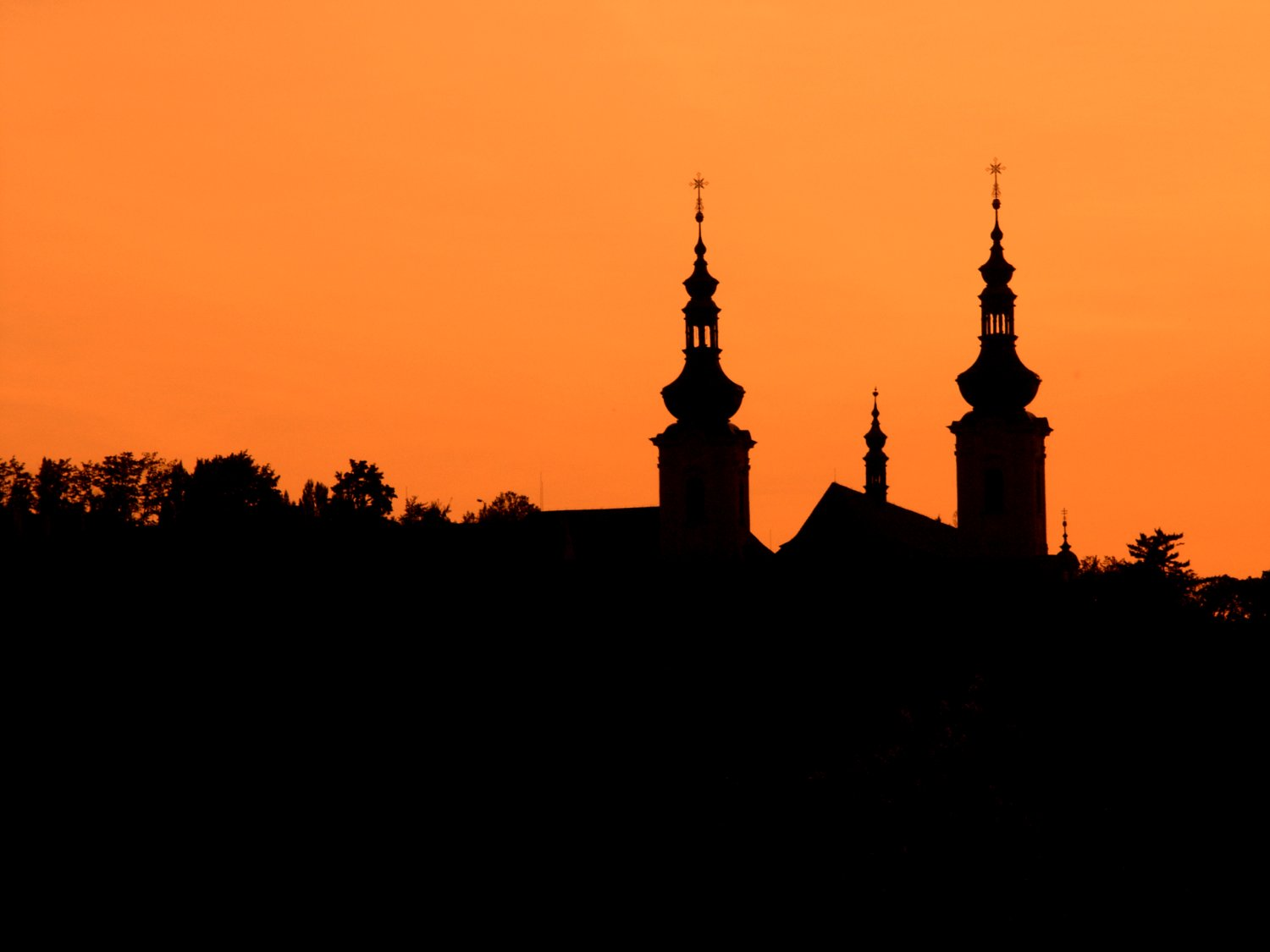 Silhouette/Schattenriss – Kloster Strahov in Prag